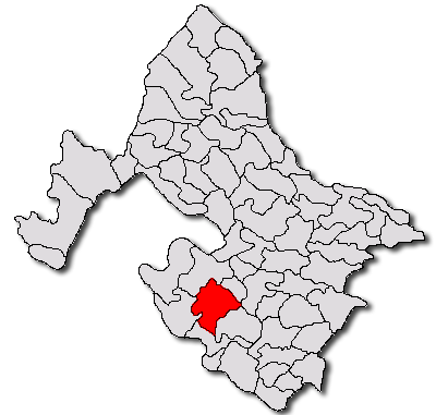 Categorie:Hărţi ale judeţului Mehedinţi